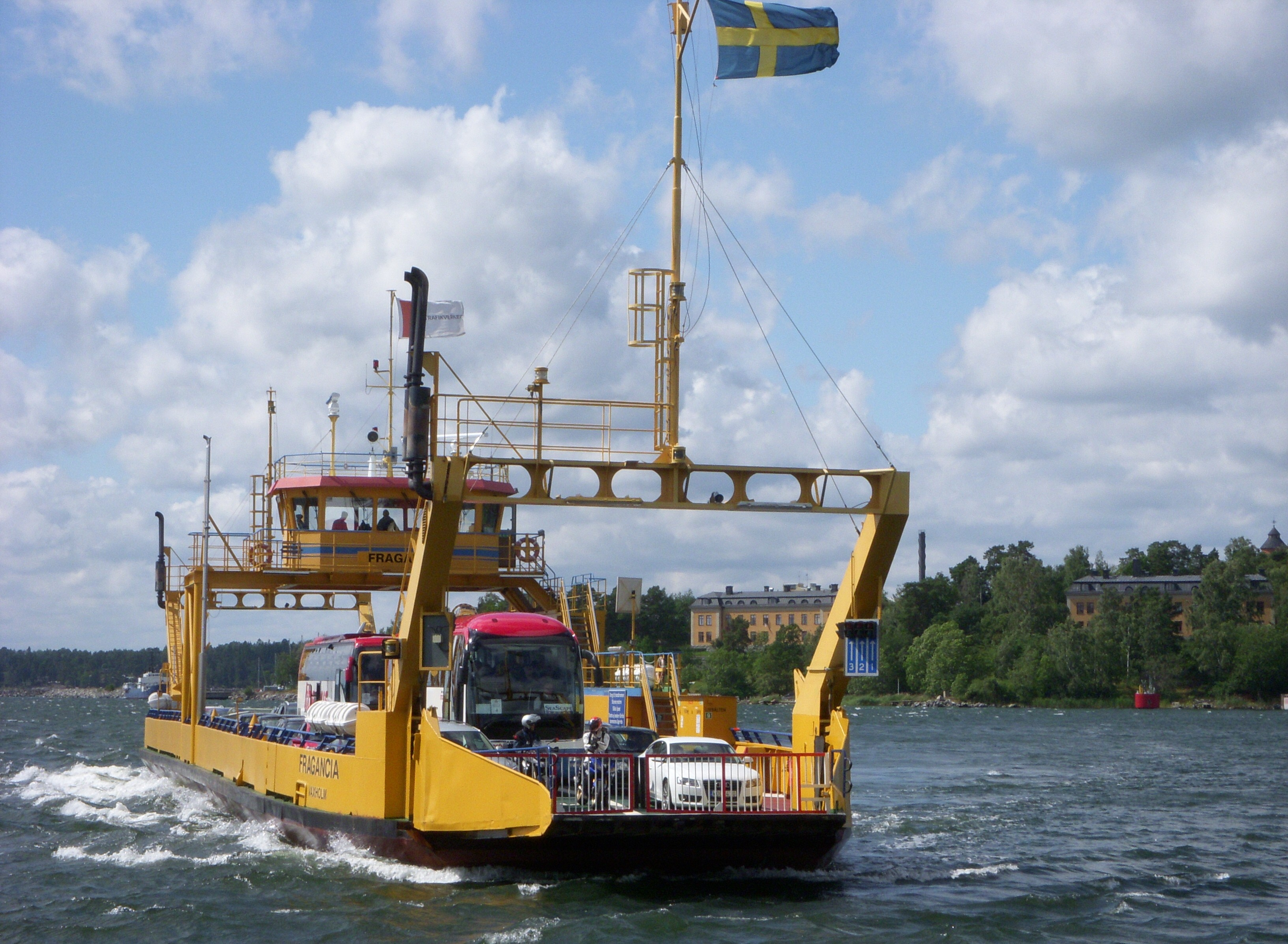 Trafikverket Färjerederiets M/S Fragancia på Oxdjupet